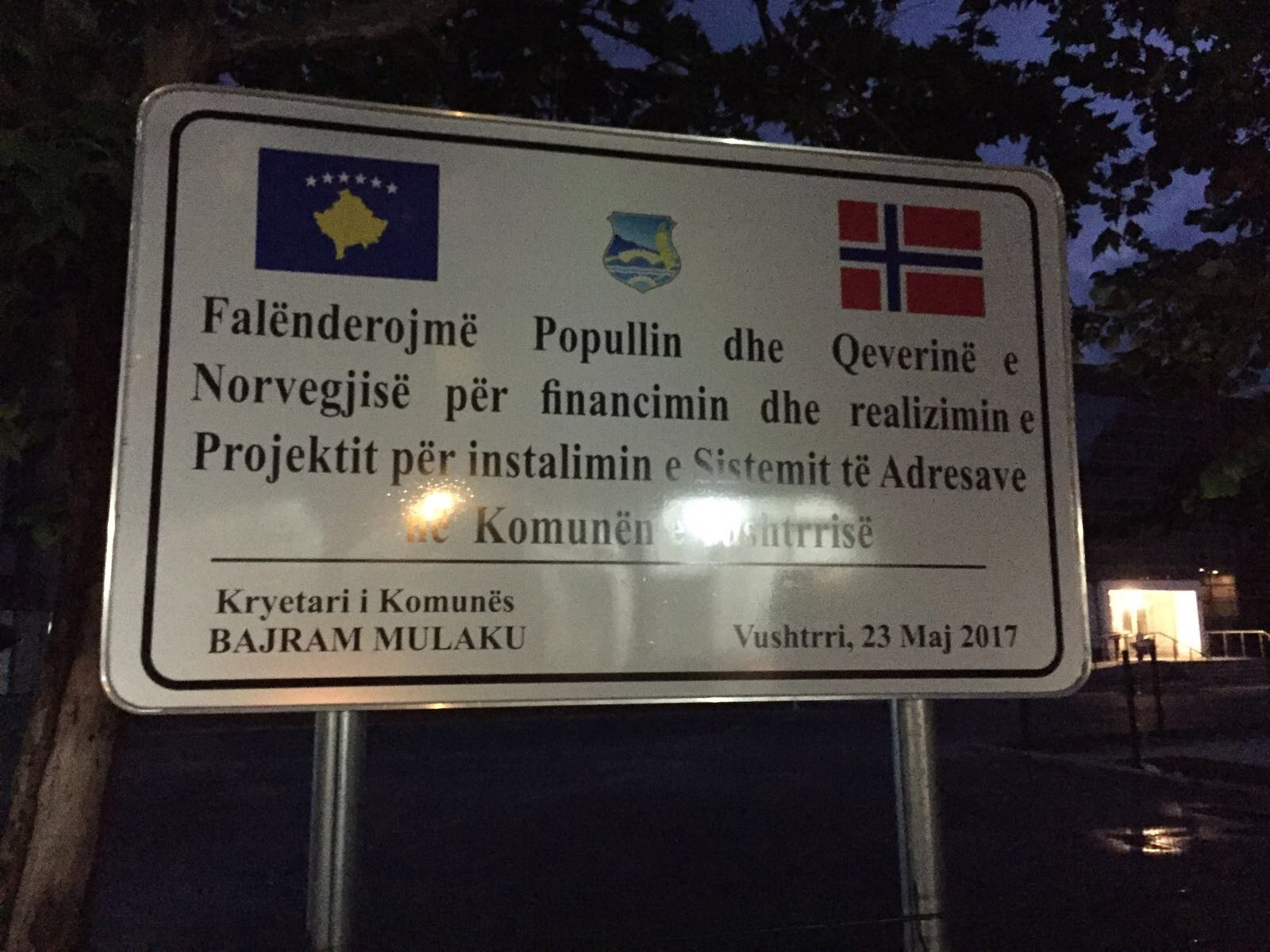 Dankestafel an Norwegen für den Bau der Verwaltung für die Gemeinde Vushtrria in Vushtrria